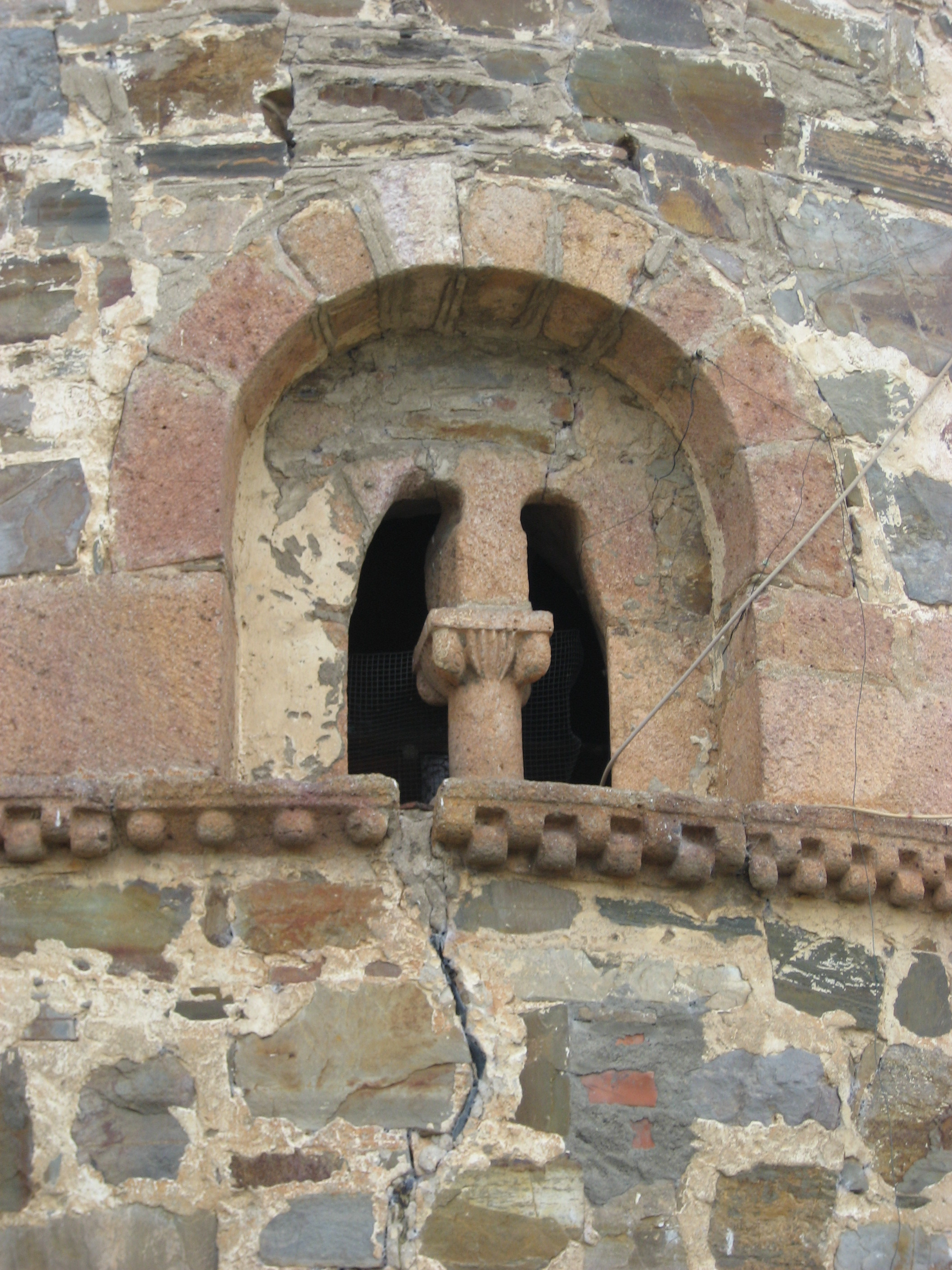 Detalle del testero de la iglesia de Santa María de Vizbayo, en Otero de Ponferrada (Región de El Bierzo)